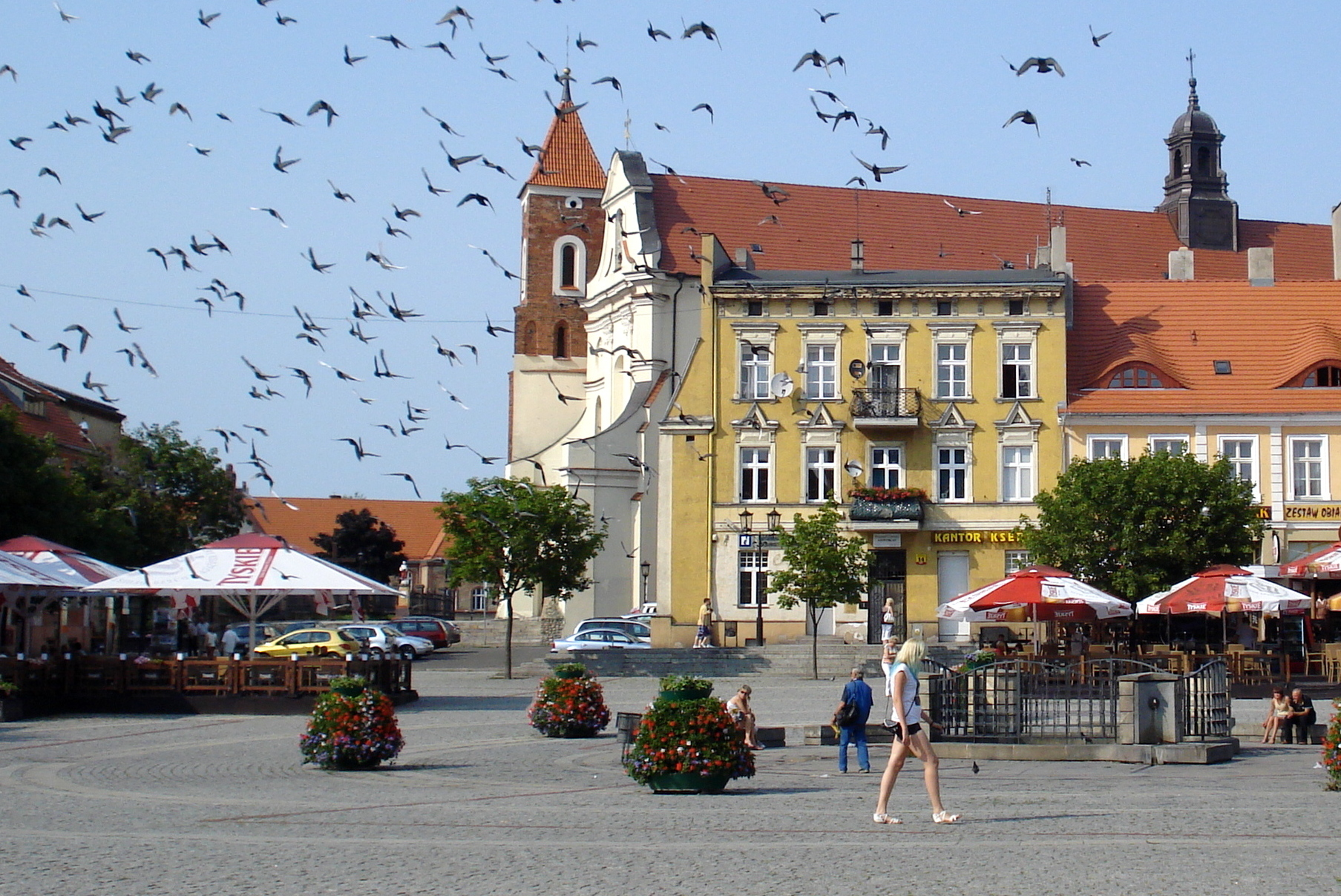 Gniezno Rynek, widok na Zespół Pofranciszkański